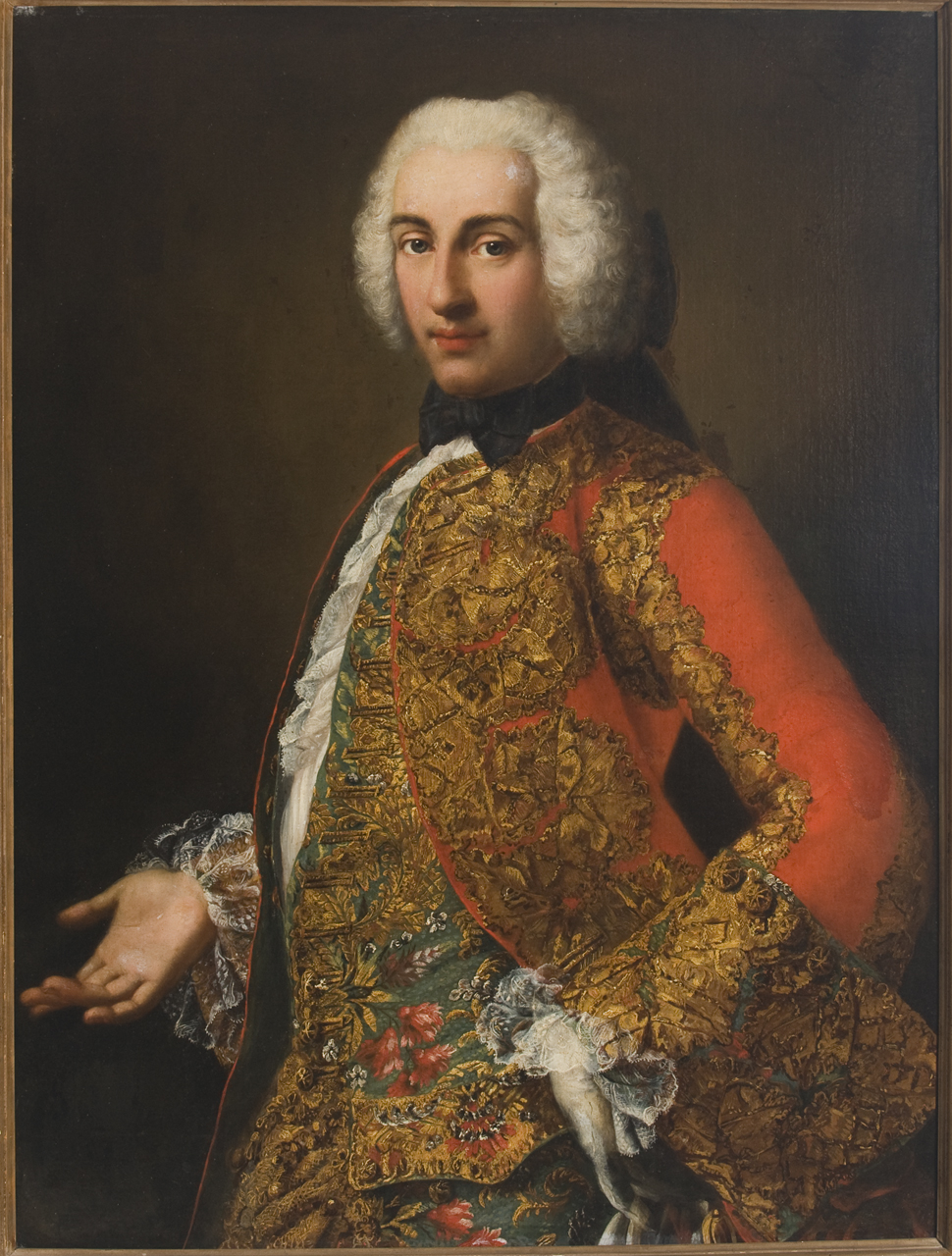 Джузеппе Паскалетти. Портрет Маркантонио Колонна ди Стильяно.